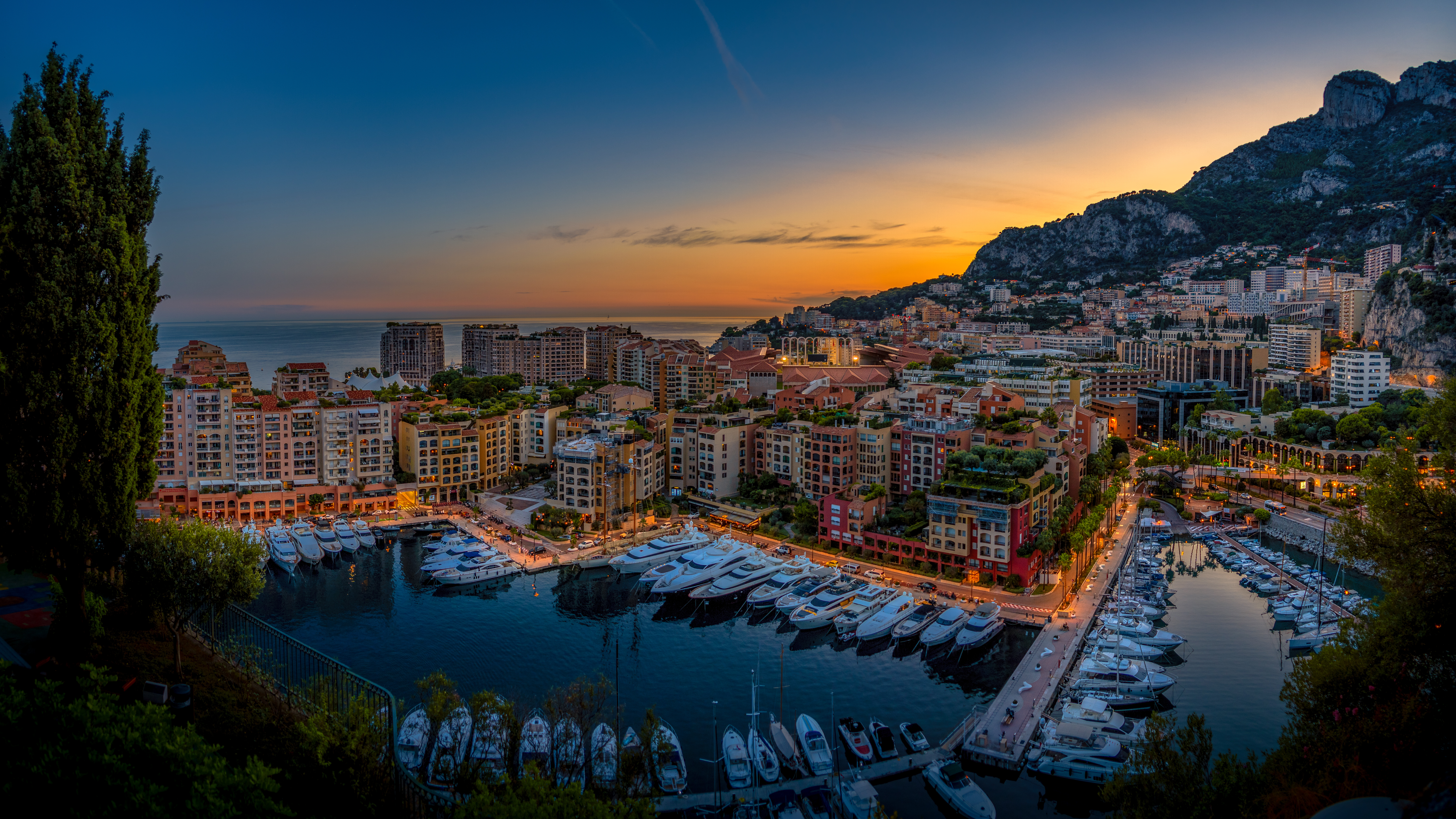 🡆 Instagram 🡄